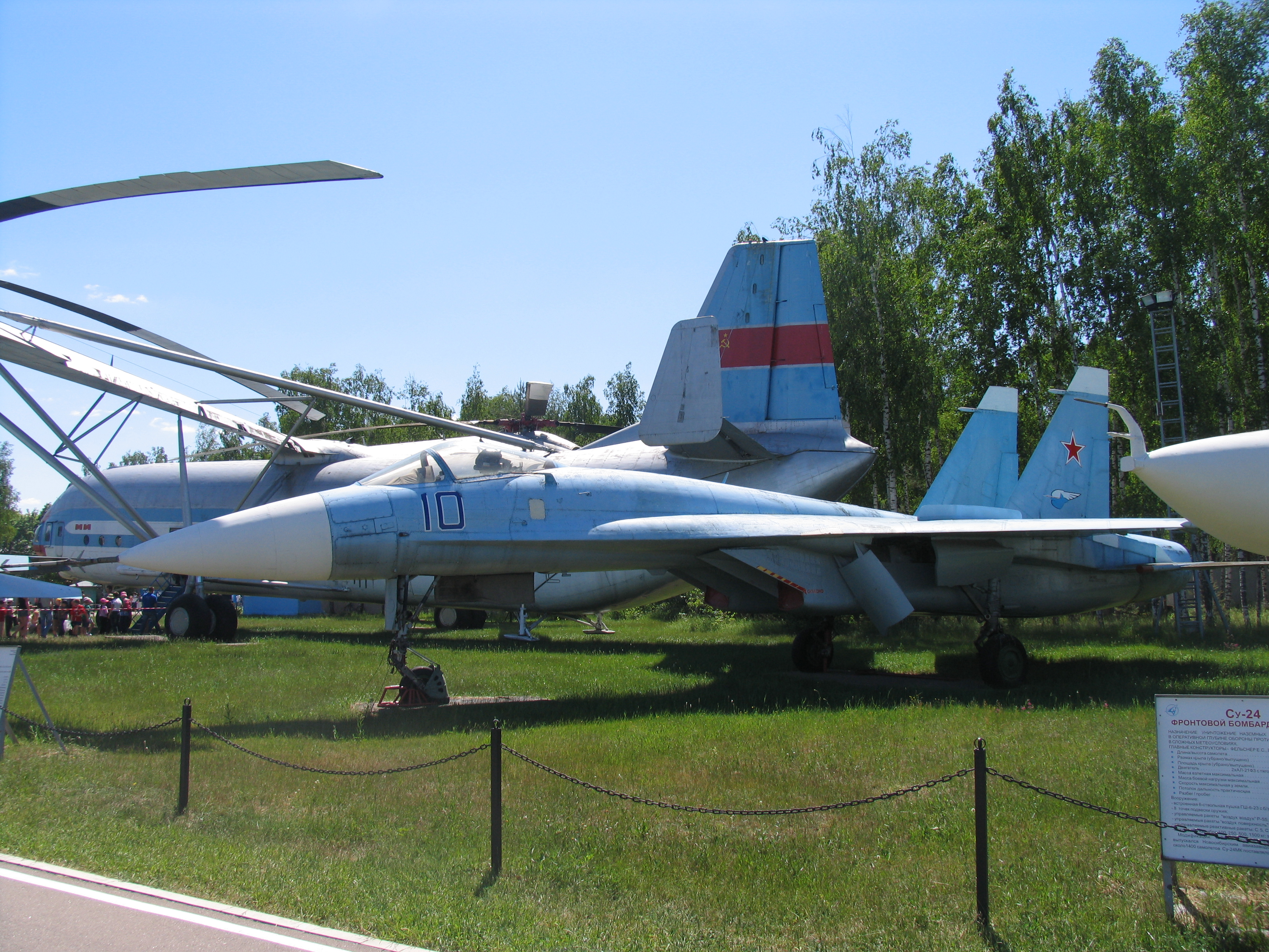 Т-10-1 - первый прототип истребителя Су-27.